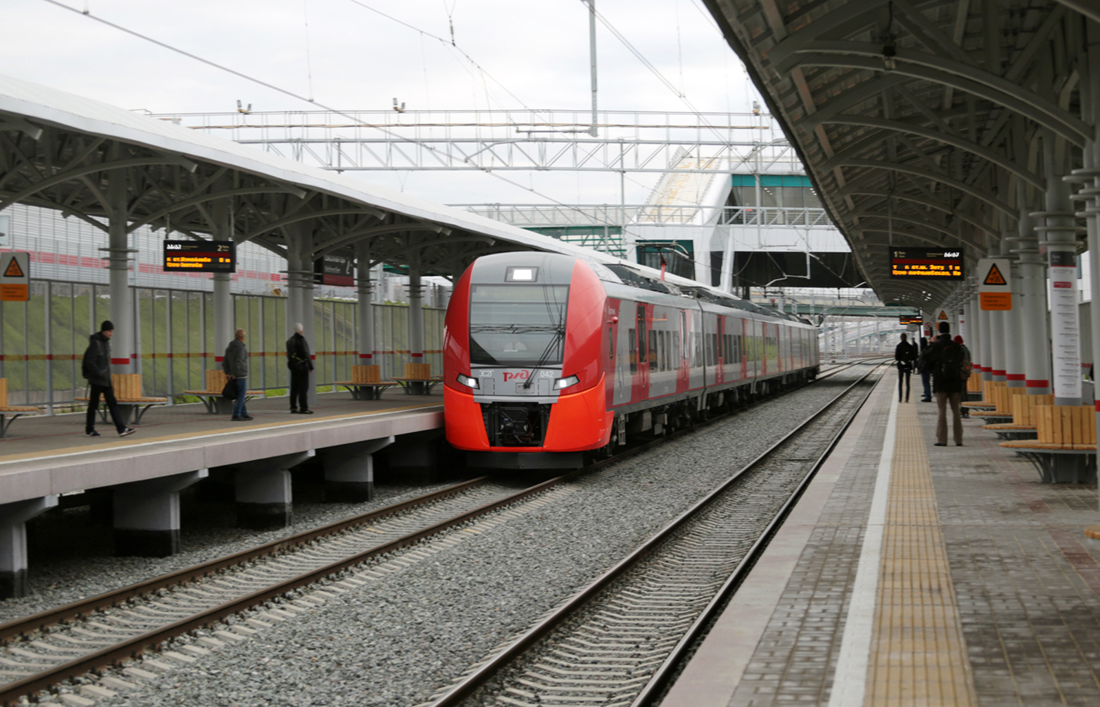 Электропоезд ЭС2Г 042 прибывает на платформу Соколиная Гора